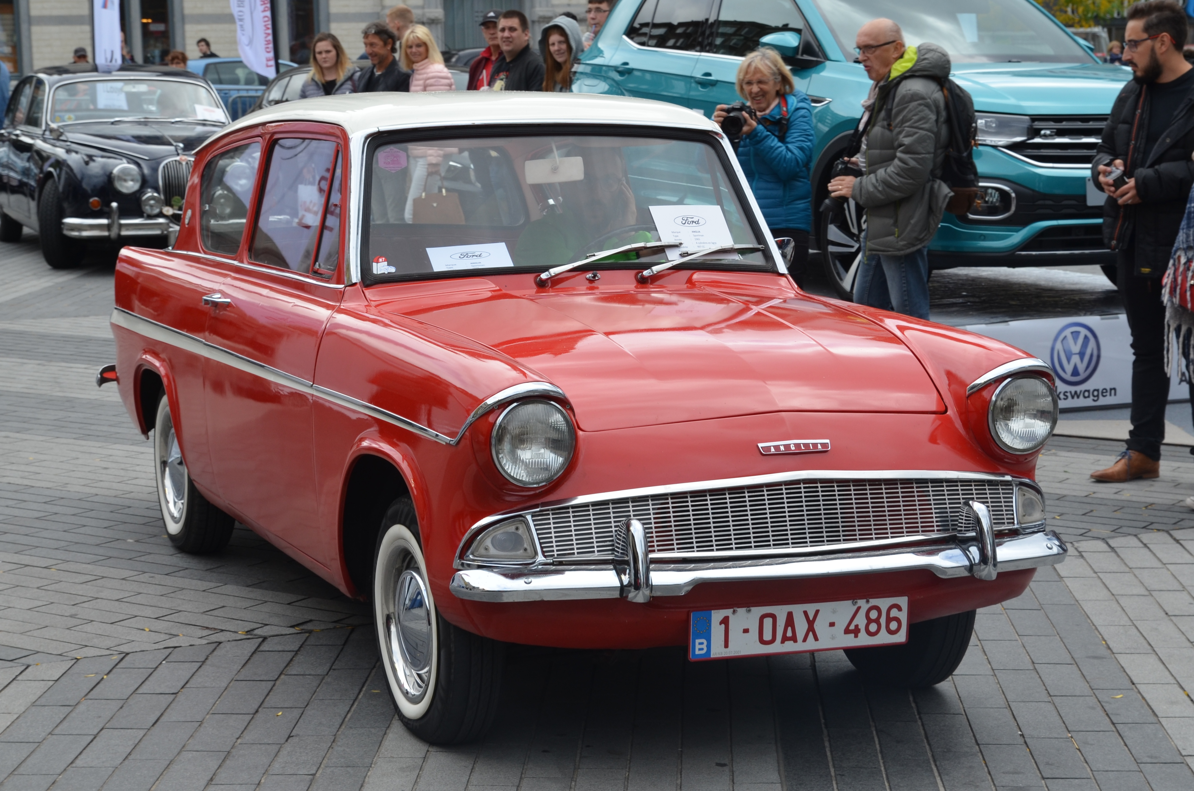 Ford Anglia Sportsman. Version élaborée pour le marché belge, elle offrait une roue de secours logée verticalement contre la face arrière extérieure du coffre reposant sur les ferrures de pare-chocs. Charleroi, Place Verte.